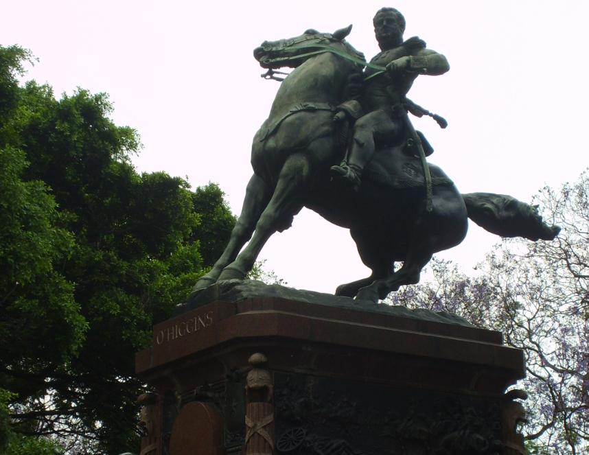 Monumento a Bernardo O'Higgins en Buenos Aires, obra del escultor chileno Guillermo Córdova